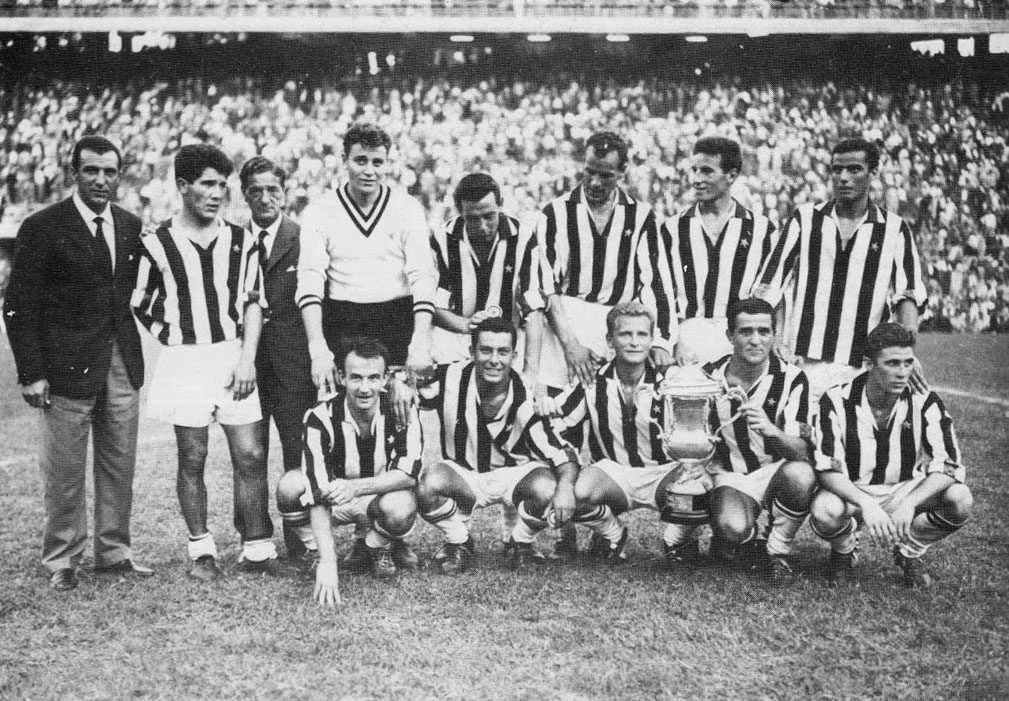 Milano (Italia), stadio San Siro, 13 settembre 1959. La Juventus F.C. in posa dopo il successo sul F.C. Internazionale (4-1) nella finale di Coppa Italia 1958-59; la partita, seppur appartenente alla stagione sportiva 1958-59, venne disputata nel settembre 1959 vedendo pertanto in campo la rosa dell'annata 1959-60. Da sinistra, in piedi: C. Parola (allenatore), O. Sívori, R. Cesarini (direttore tecnico), C. Mattrel, U. Colombo, J. Charles, E. Castano, B. Nicolè; accosciati: S. Cervato, G. Stivanello, G. Boniperti (capitano), F. Emoli, B. Sarti. Si noti il trofeo in palio: utilizzato unicamente per le edizioni del 1958 e del 1958-59, quelle del ripristino della competizione dopo una pausa di quindici anni, appare molto differente rispetto alla versione stabilmente in uso dall'edizione del 1959-60.